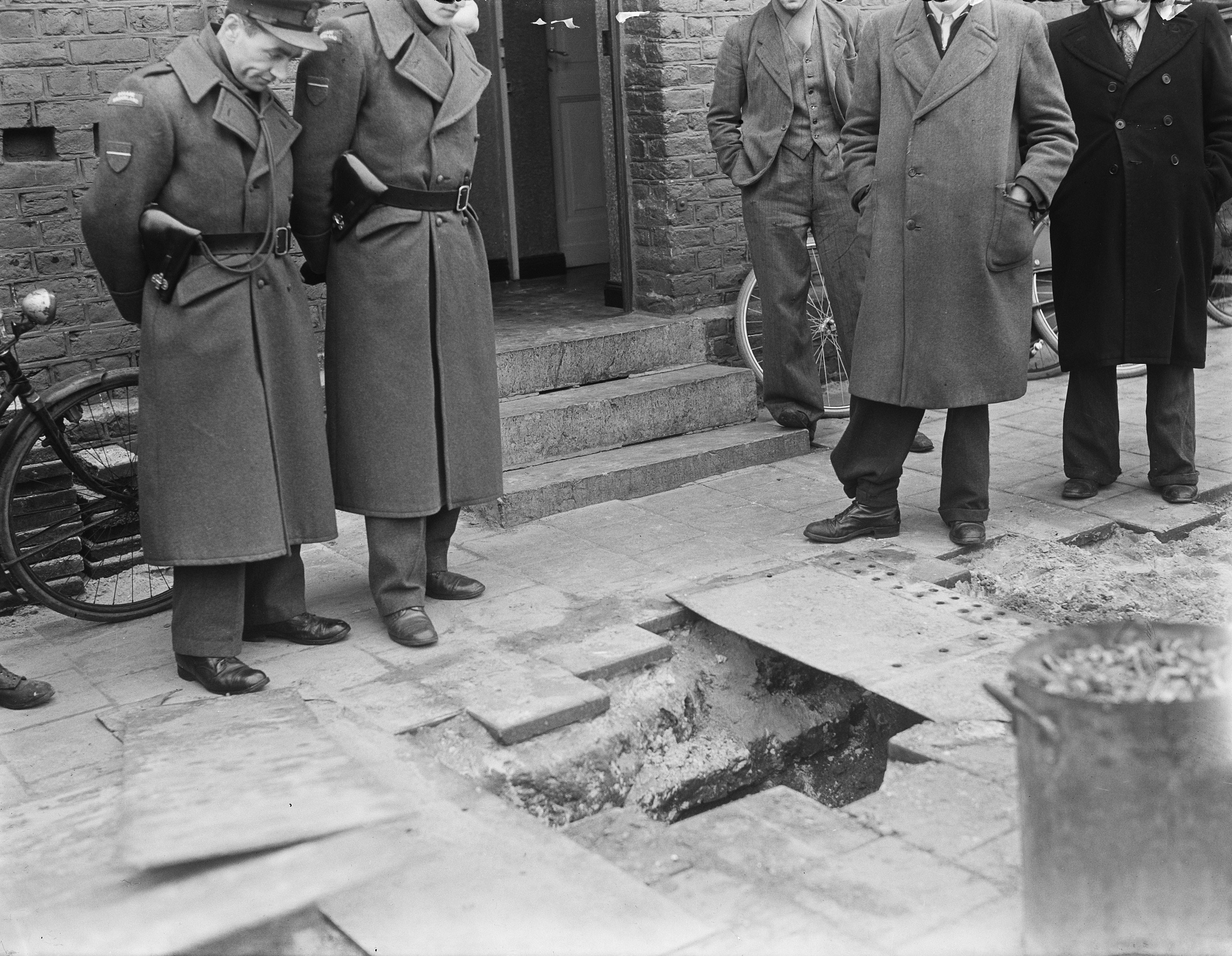 Collectie / Archief : Fotocollectie Anefo Reportage / Serie : [ onbekend ] Beschrijving : Smokkeltunnel te Kerkrade Datum : 30 maart 1950 Locatie : Kerkrade Fotograaf : Oorschot, […] van / Anefo Auteursrechthebbende : Nationaal Archief Materiaalsoort : Glasnegatief Nummer archiefinventaris : bekijk toegang 2.24.01.09 Bestanddeelnummer : 903-8954